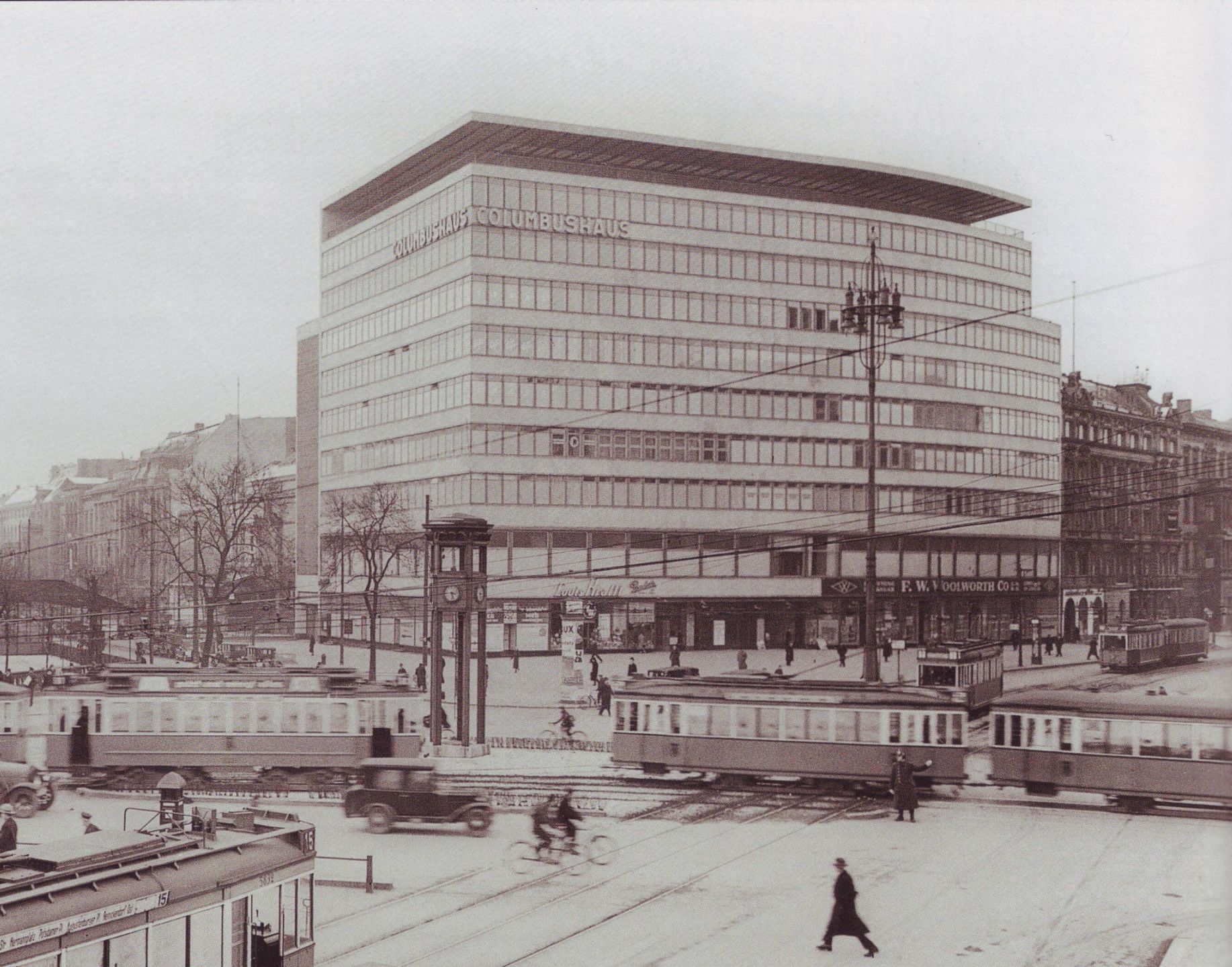 Berlin. Potsdamer Platz mit Columbushaus.